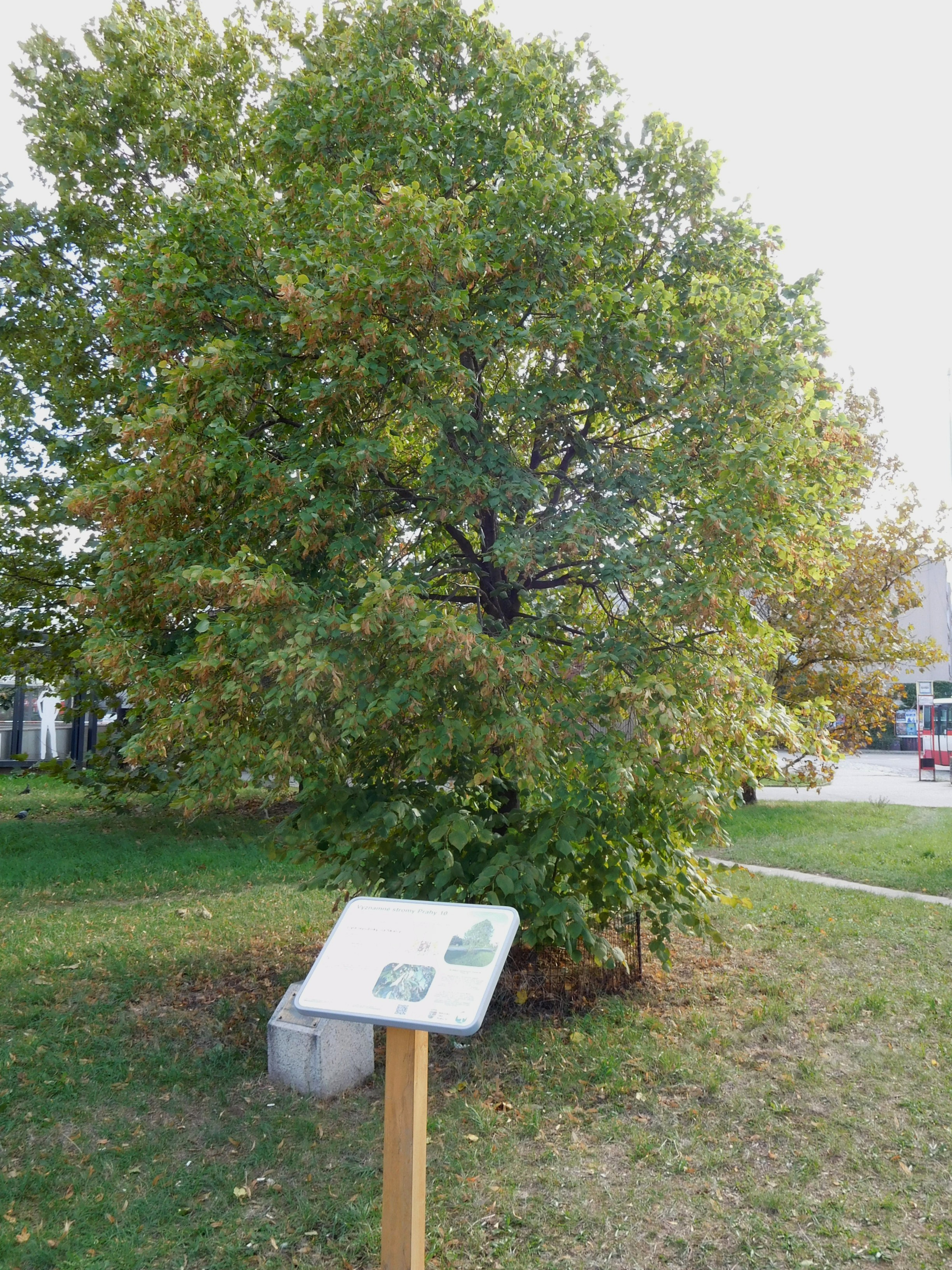 Praha - Strašnice, Lípa republiky na Skalce (vysazena 28.10.1998)